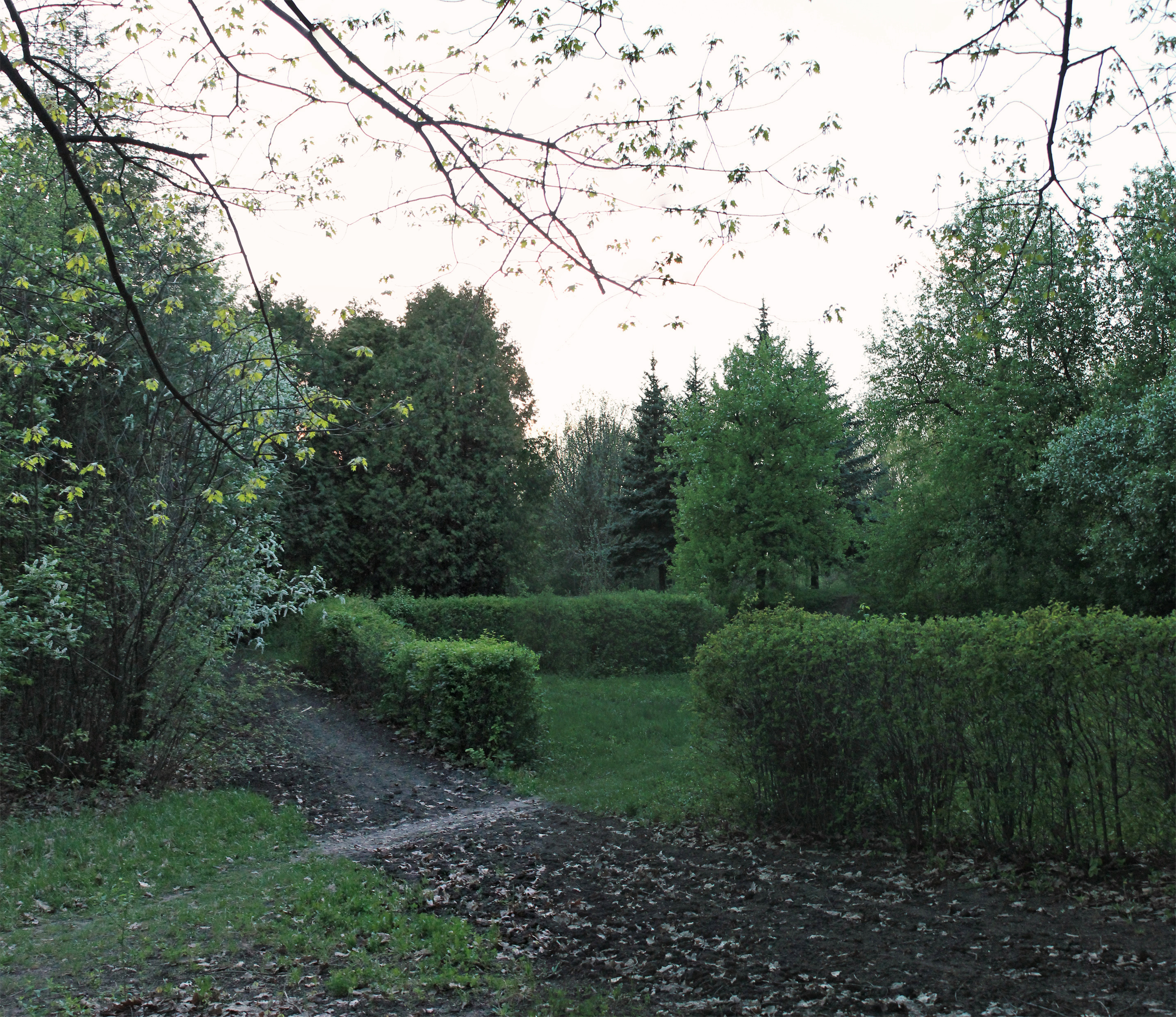 Дендрологічний парк Харківського національного аграрного університету ім. В. В. Докучаєва, с.Рогань, Харківський р-н.